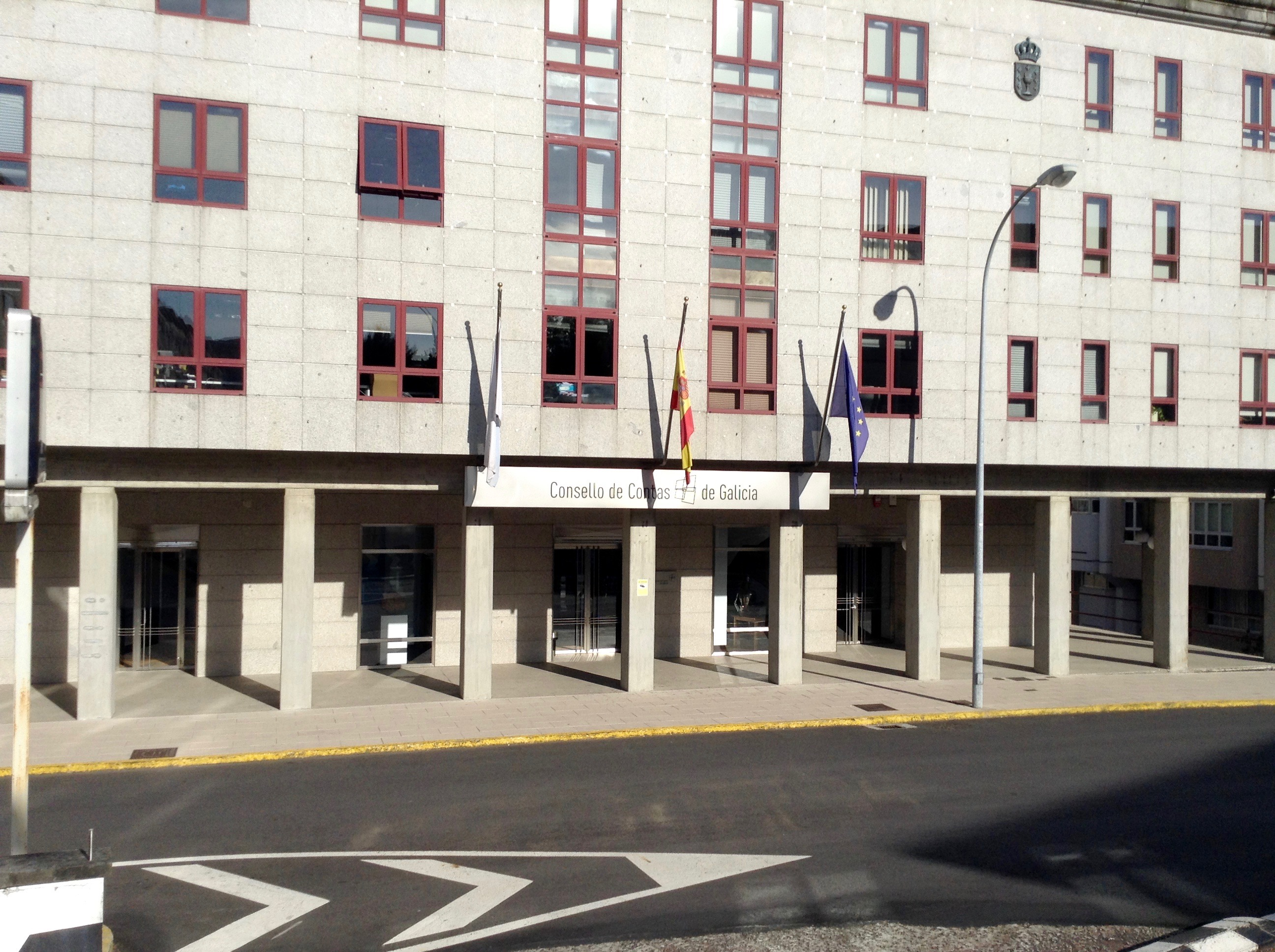 Sede do Consello de Contas, Santiago de Compostela